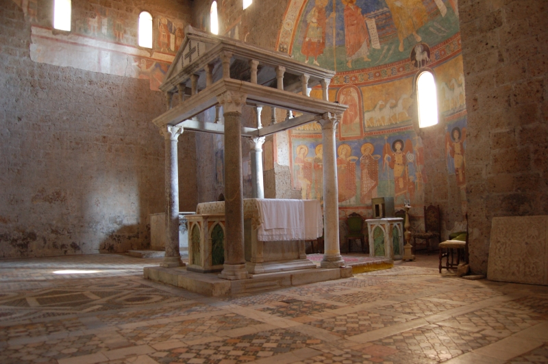 fotografia scattata da campaz con il permesso della persona che custodisce la Basilica di Sant'Elia a Castel Sant'Elia (provincia di Viterbo)